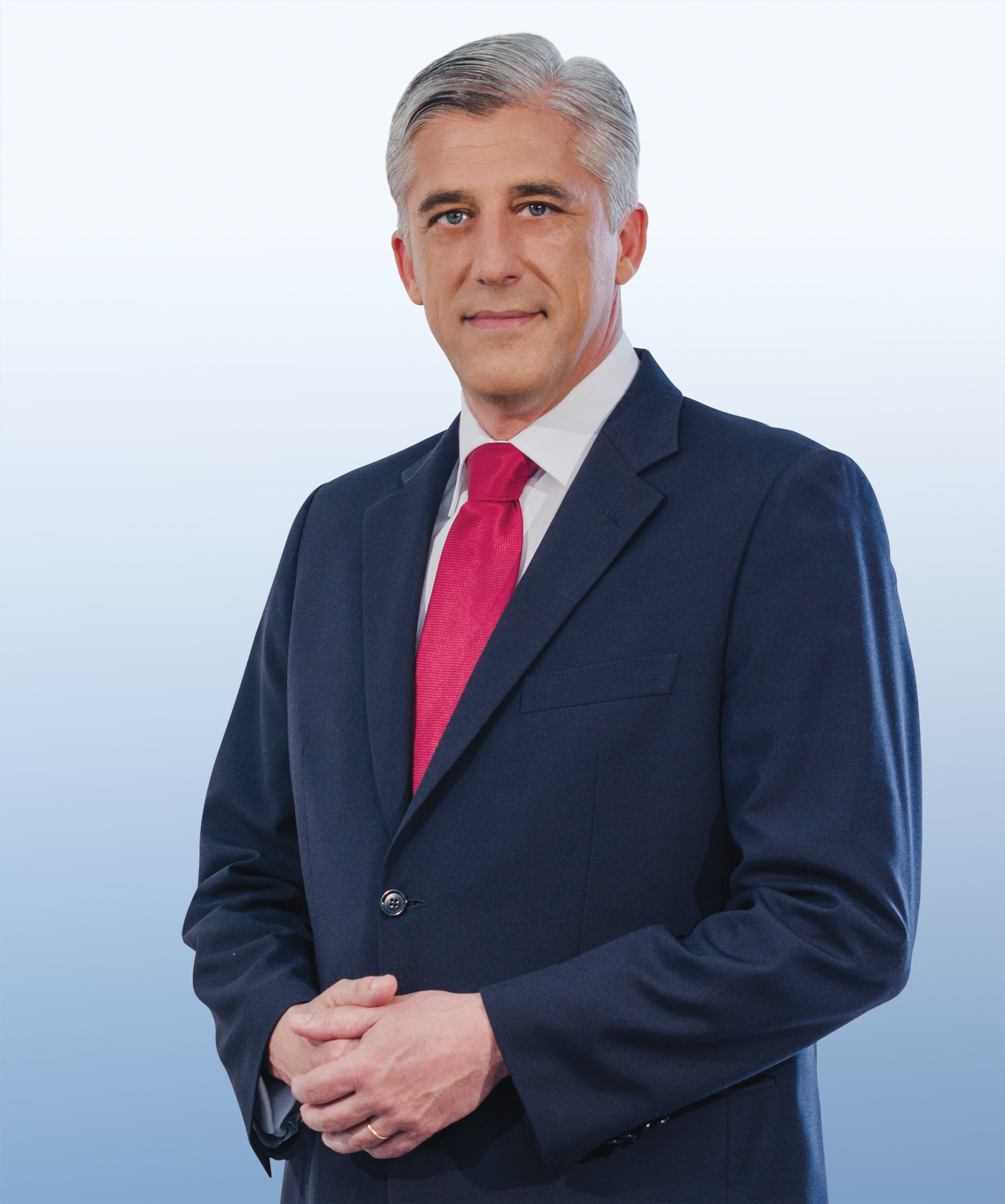 Duarte Freitas, Presidente do PSD/Açores